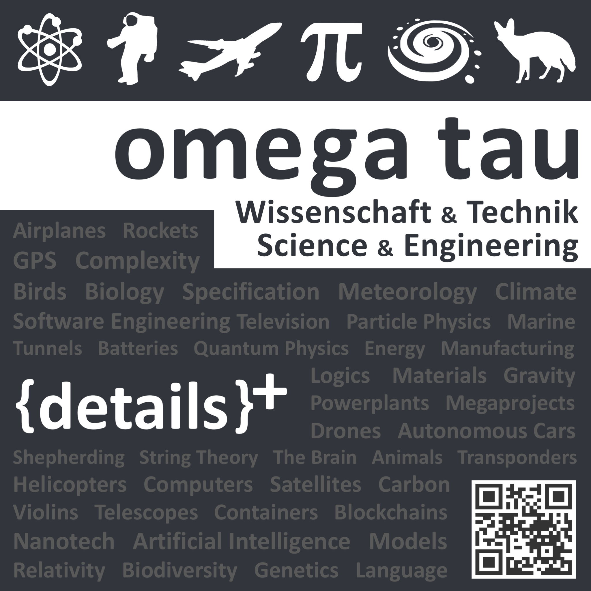 Logo des Wissenschafts Podcasts omega tau